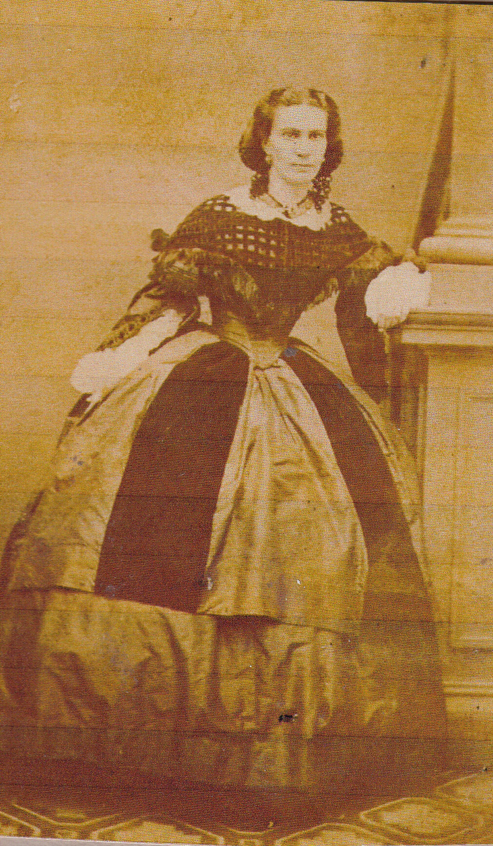 Fotografía del año de 1876 en Santiago de Chile,. Emilia Solar Valdés de Vargas tuvo dos hijos. que fueron Luis y Casimiro. Esta fotografía se encuentra en el álbum familiar.